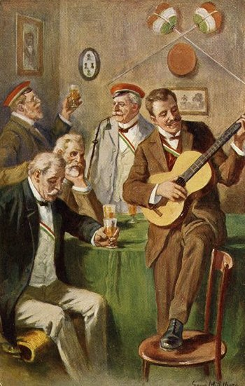 „O alte Burschenherrlichkeit“. Alte Herren einer studentischen Verbindung denken beim Trinken und Singen an ihre Jugendzeit zurück. Dabei tragen sie Couleur, ein Band mit den Farben rot-weiß-grün und teilweise eine rote Studentenmütze. An der Wand zwei gekreuzte Korbschläger (Waffen für die studentische Mensur) und eine weitere Mütze sowie alte Silhouetten früherer Studenten.